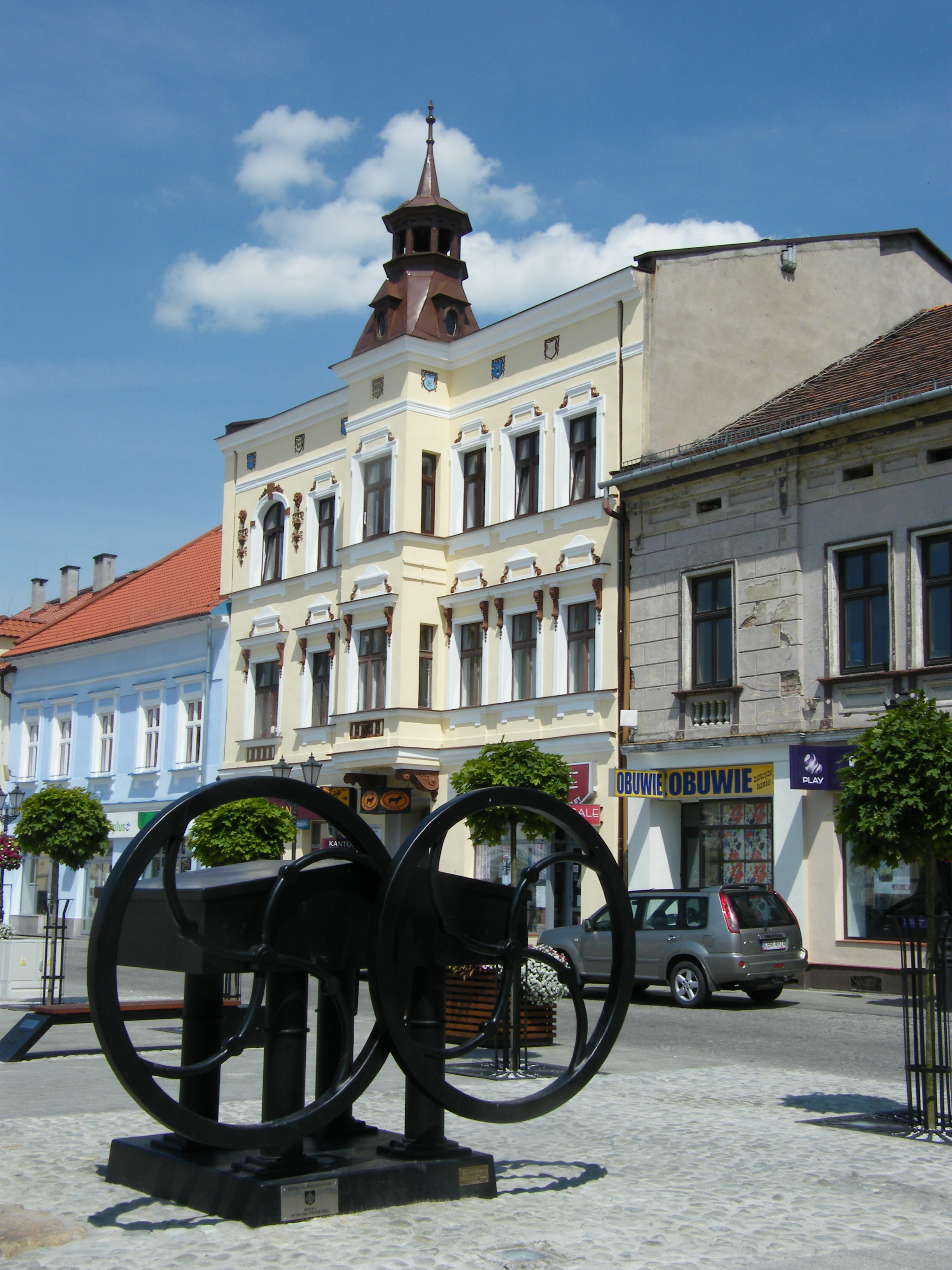 Oświęcim, ratusz, 1 poł. XIX